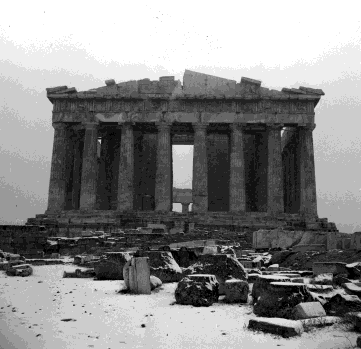 Le Parthenon